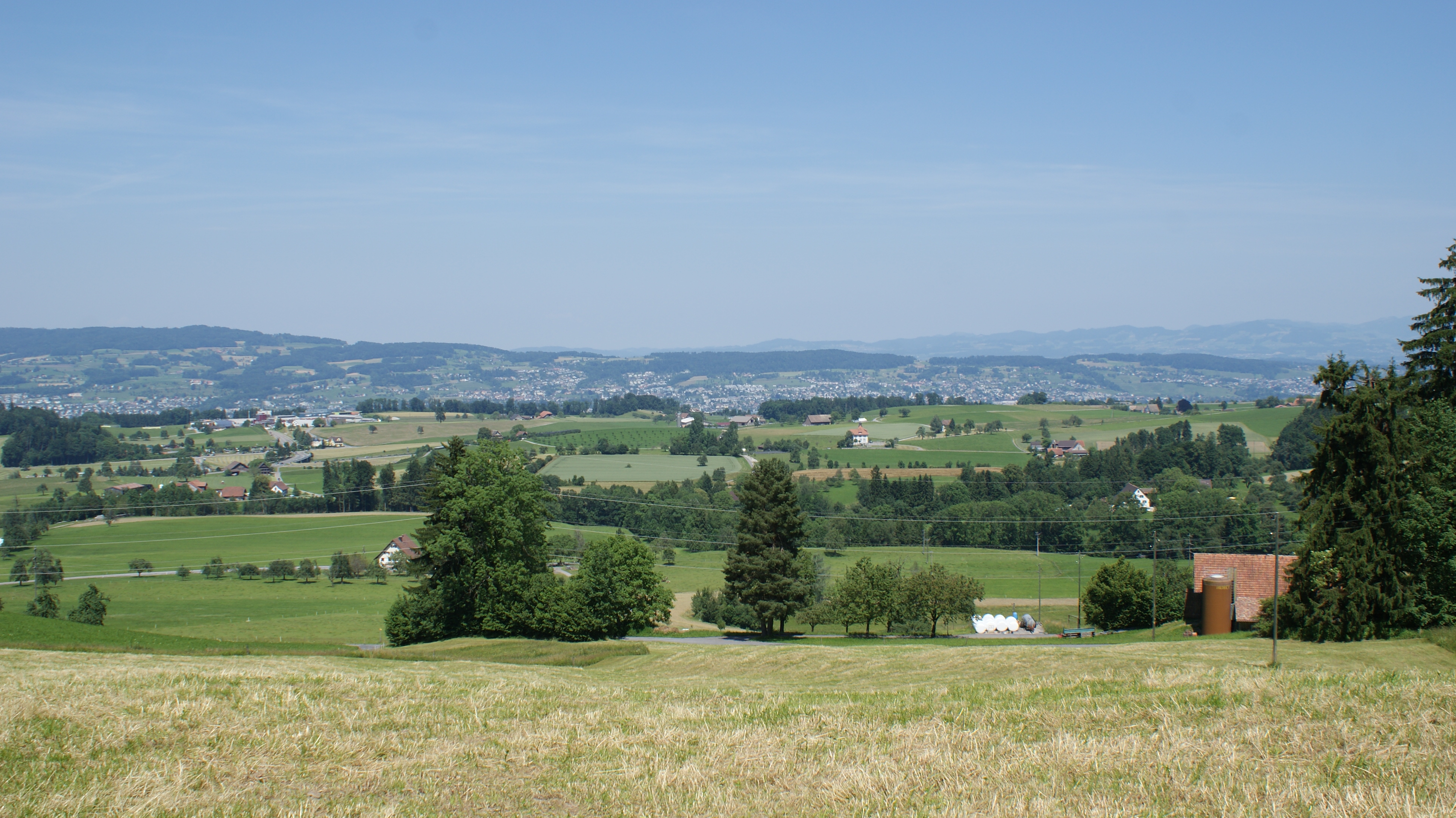 Eine Fernansicht des Wädenswiler Bergs (Neubüel, Stocken). Die Aufnahme wurde etwas oberhalb des Stockenweidlis an der Grenze der Gemeinde Wädenswil zur Gemeinde Hirzel ZH gemacht. Am Horizont sieht man das rechte Zürichseeufer.